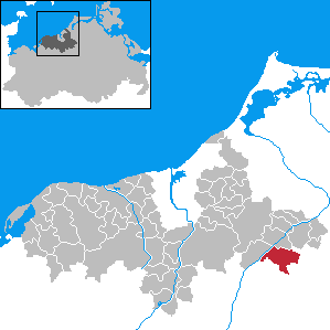 Selpin in Mecklenburg-Western Pomerania - District Bad Doberan